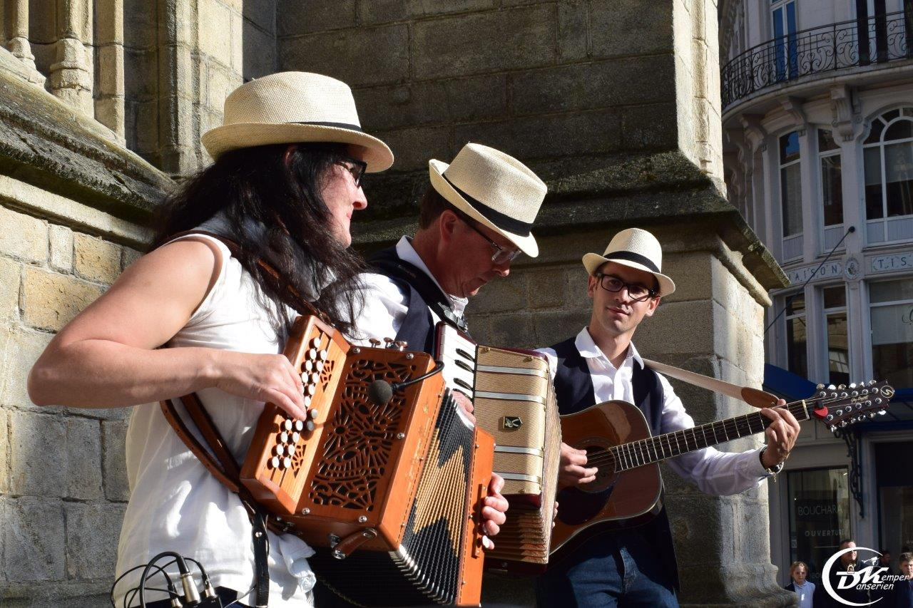 Trois musiciens du Cercle Danserien Kemper lors d'une animation (été 2017)